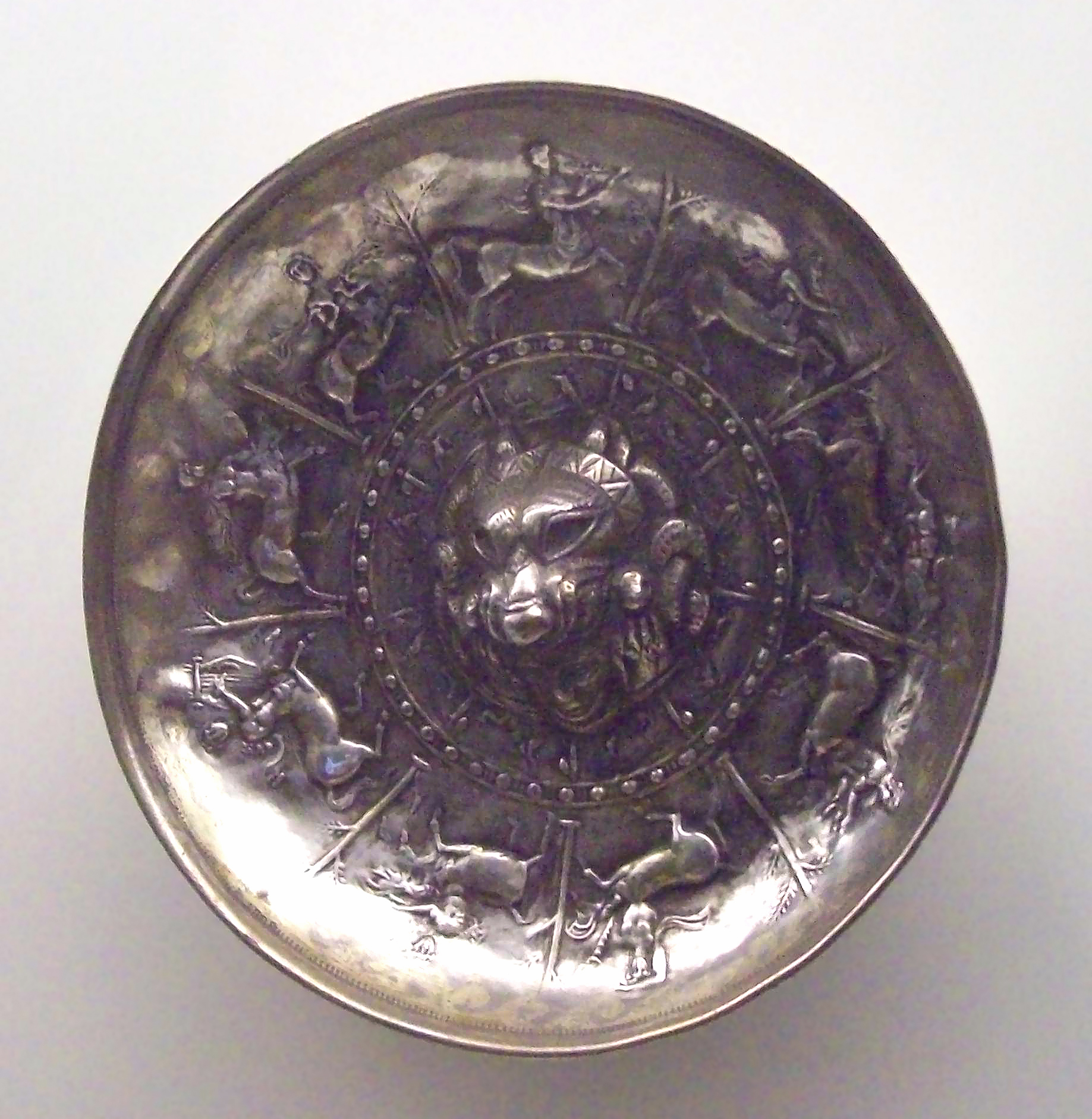 An Iberian patera.